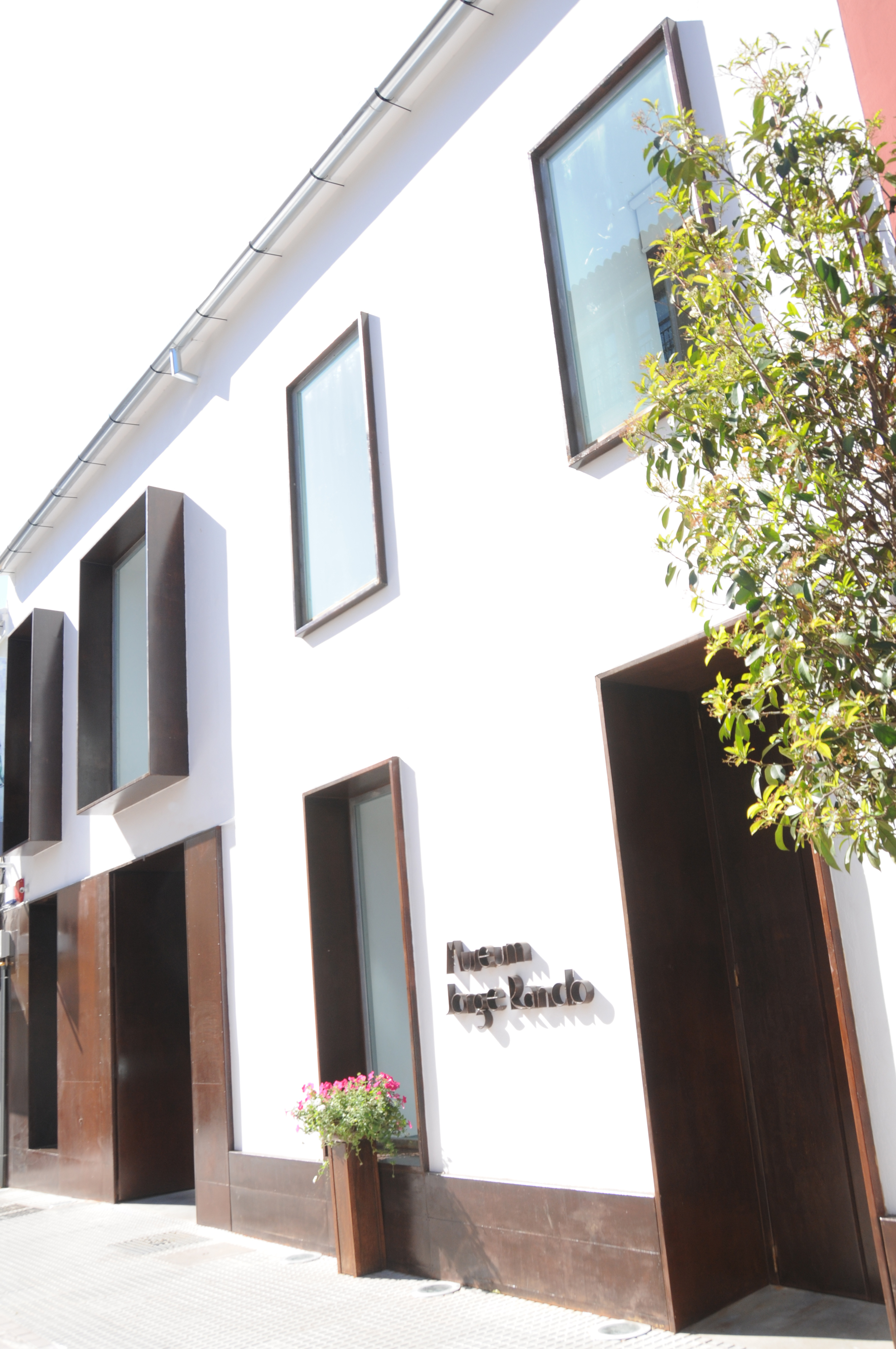 Fachada del Museum Jorge Rando